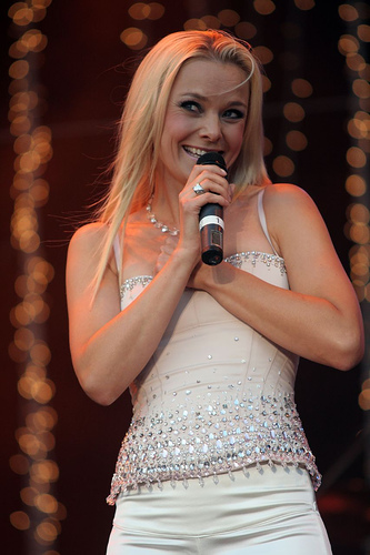 Sofia uppträde på Schlagerkvällen i Tanto